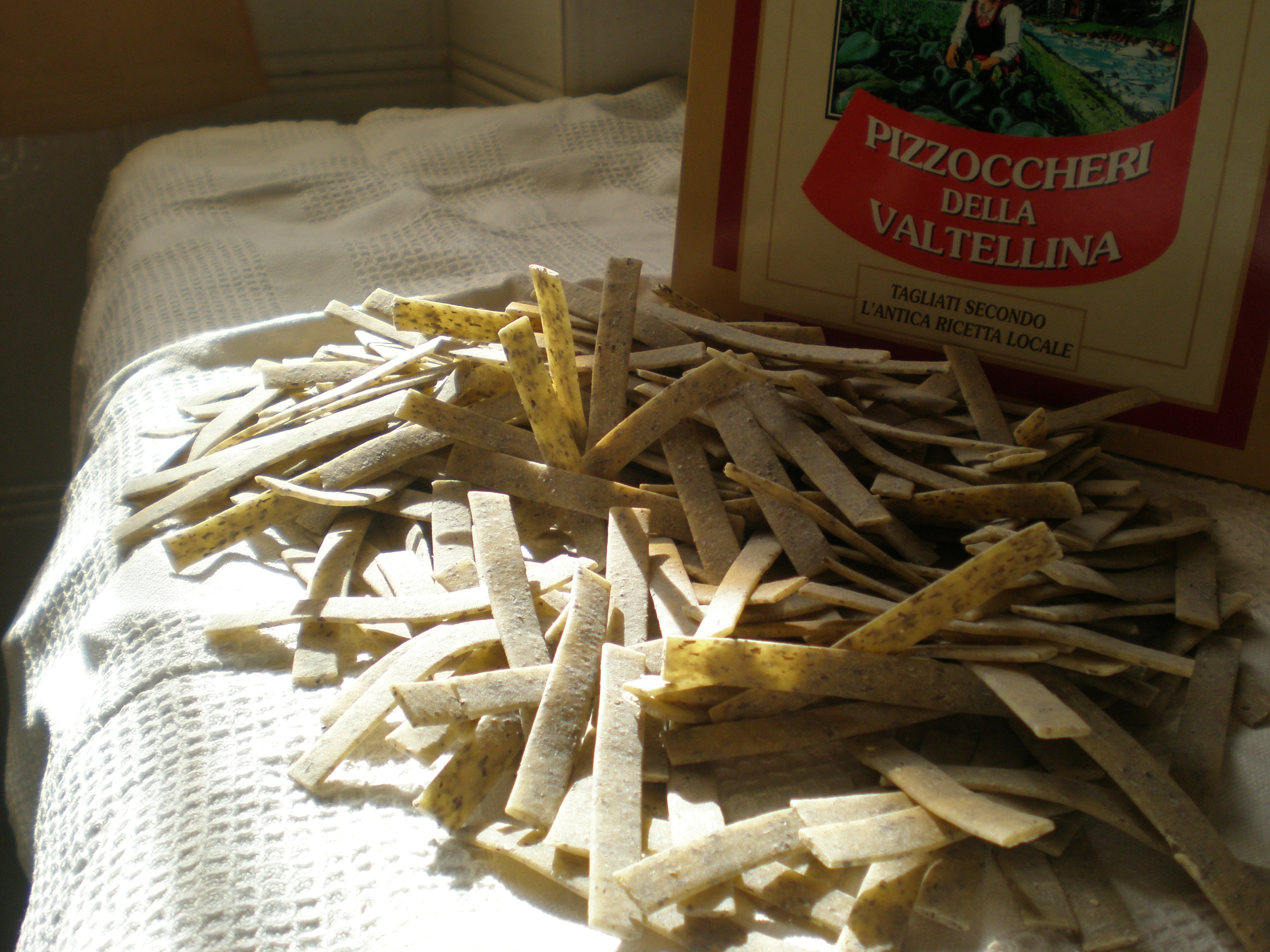 Pizzoccheri secchi di produzione industriale, crudi